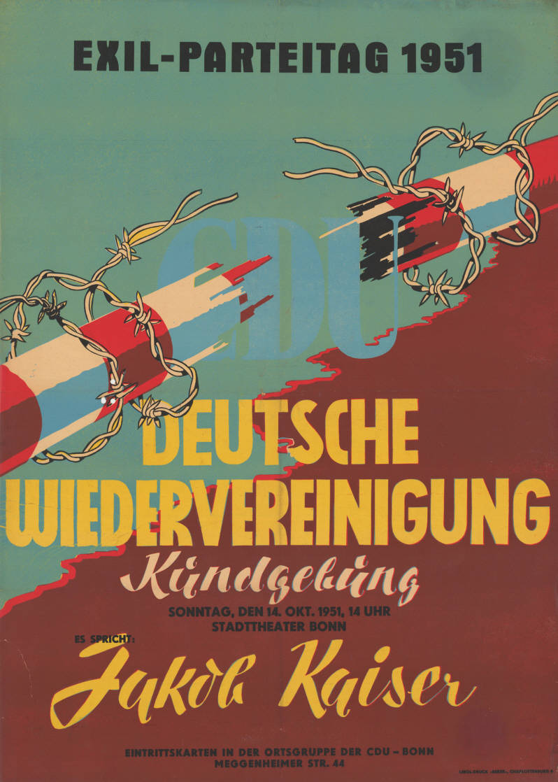 Exil-Parteitag 1951 CDU Deutsche Wiedervereinigung Kundgebung ... Es spricht: Jakob Kaiser Eintrittskarten in der Ortsgruppe der CDU - Bonn ... Abbildung: Durchbrochener mit Stacheldraht umwickelter Schlagbaum (Grafik) Plakatart: Ankündigungsplakat Auftraggeber: Exil-CDU Drucker_Druckart_Druckort: Linol-Druck "Berek", Charlottenburg Objekt-Signatur: 10-024 : 3003 Bestand: Plakate aus der SBZ/DDR (10-024) GliederungBestand10-18: Ost-CDU / CDUD / Exil-CDU Lizenz: KAS/ACDP 10-024 : 3003 CC-BY-SA 3.0 DE